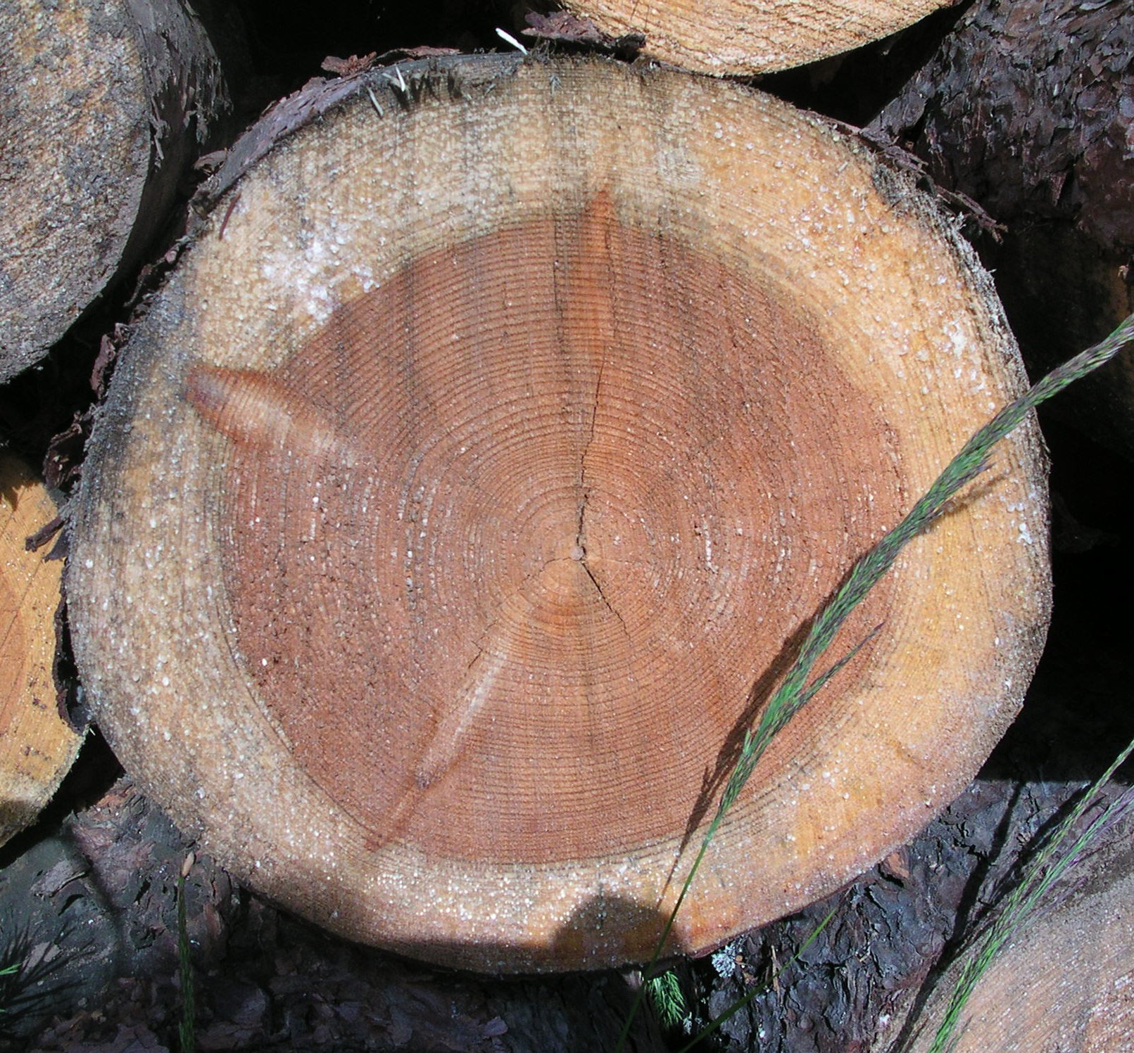 Tverrsnitt av furu viser tydlig skille mellom kjerneved og yteved